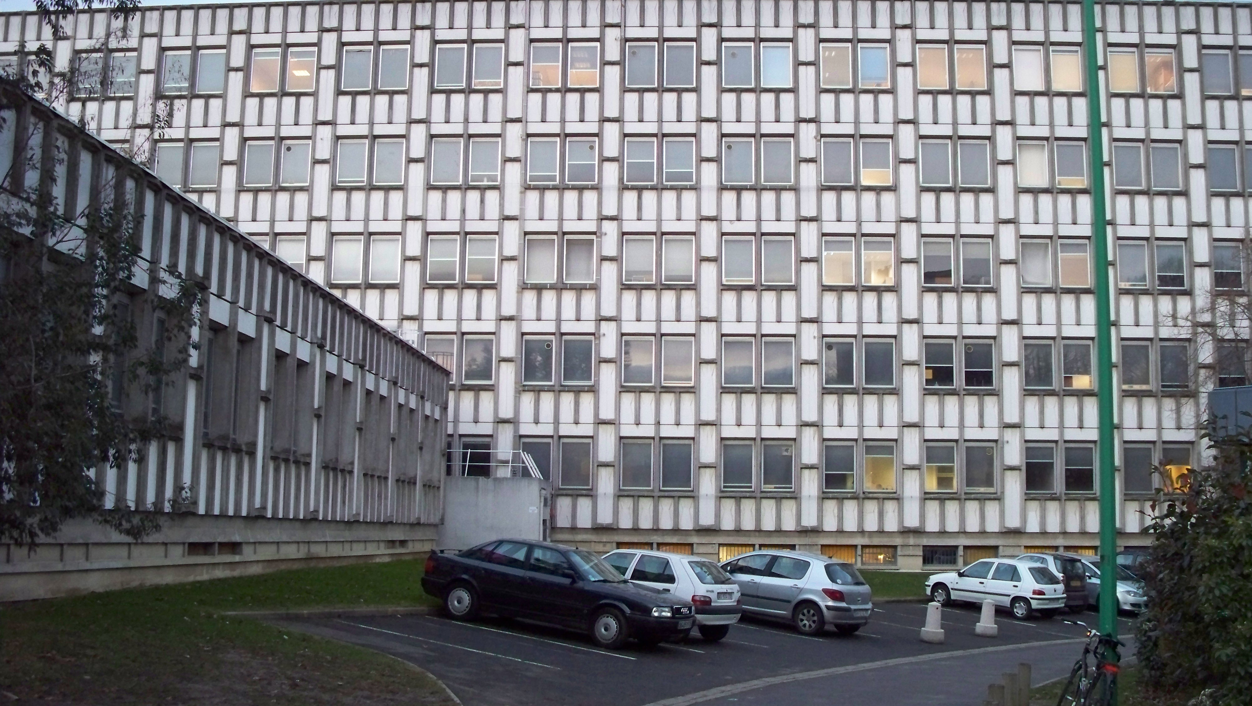 Batiment 5 (UFR Pharmacie). Campus de Villejean.